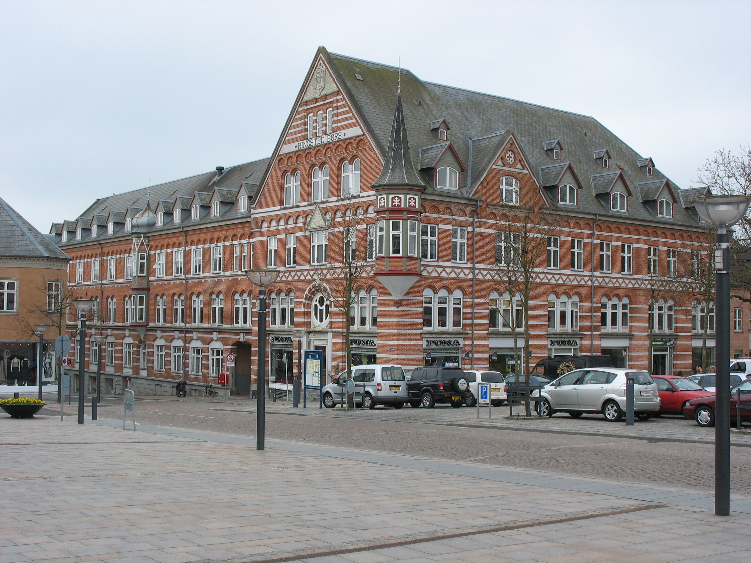 Ringsteds gamle børs